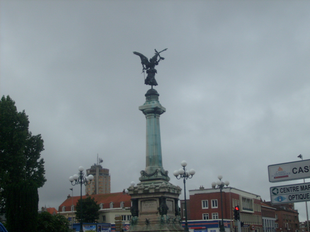 Statue de la Victoire